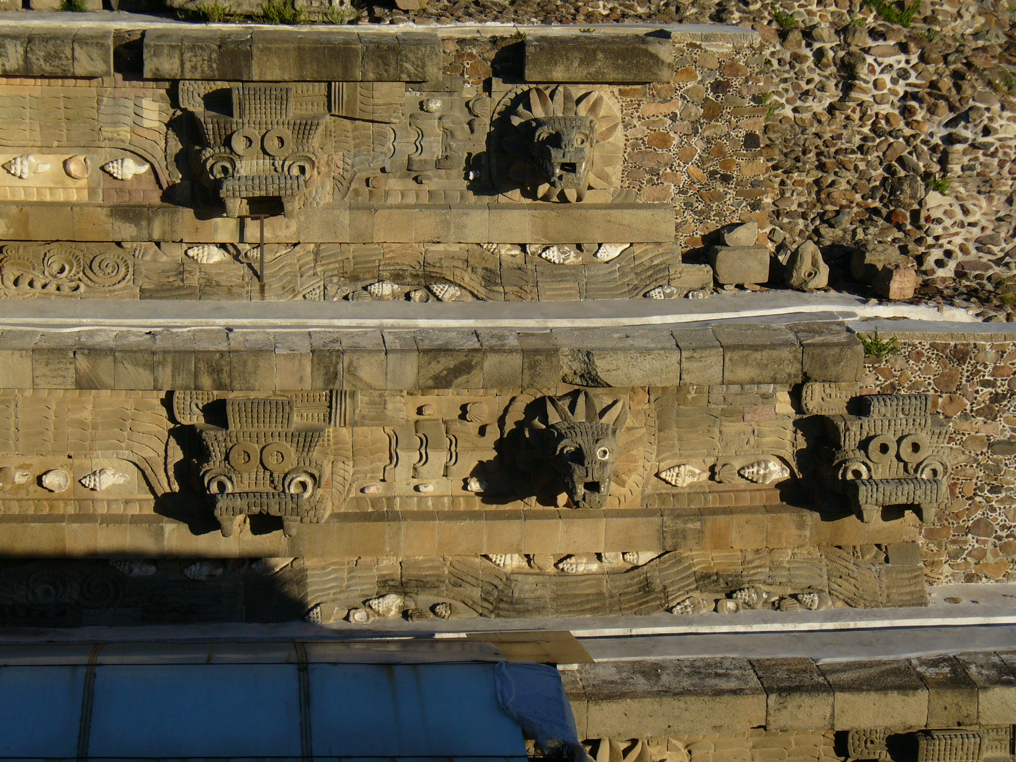 Vista parcial del Templo de Quetzalcoatl